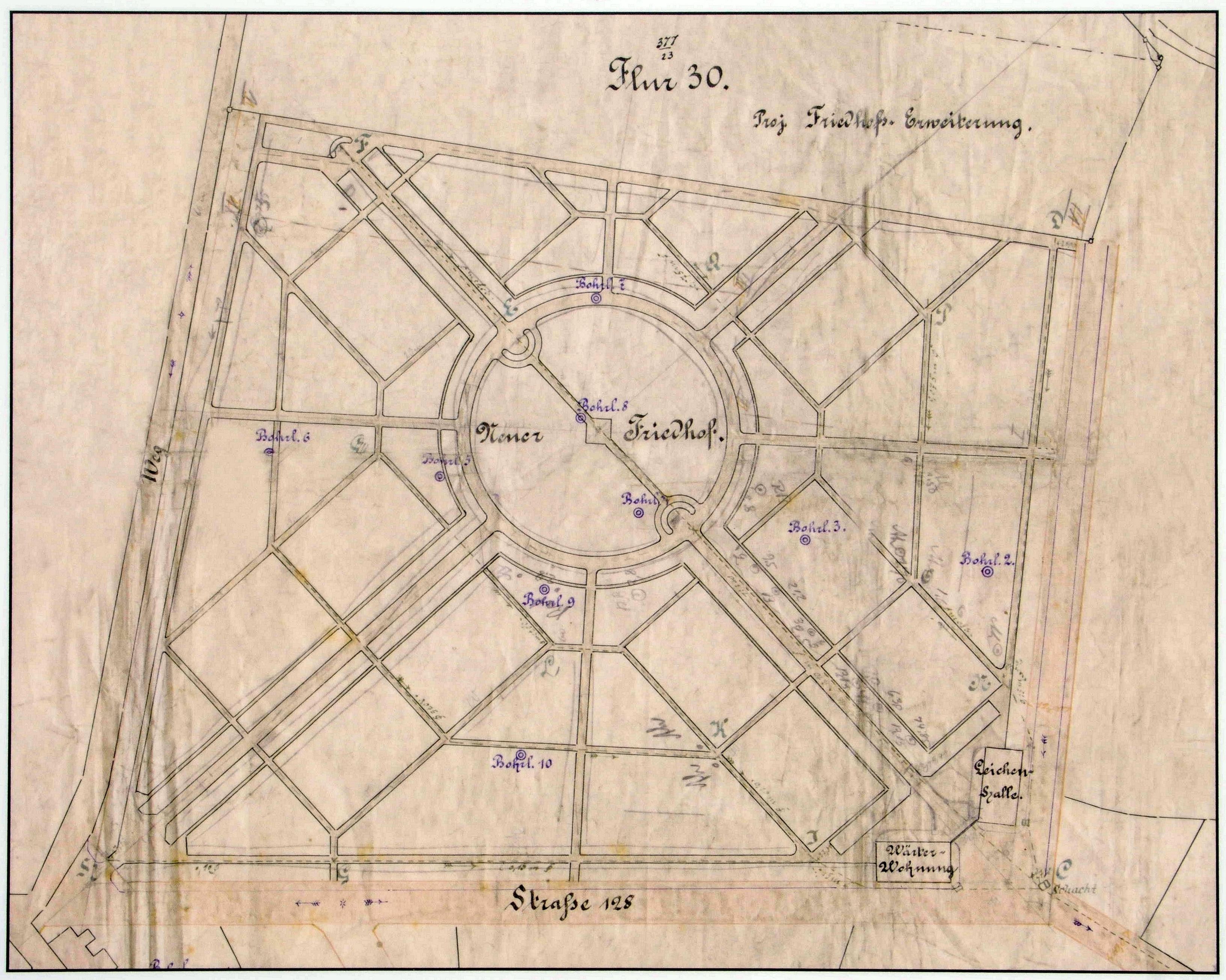 Städtischer Friedhof Bocholt. Dauerhaft aufgestellte Infotafel zur denkmalgeschützten Anlage.